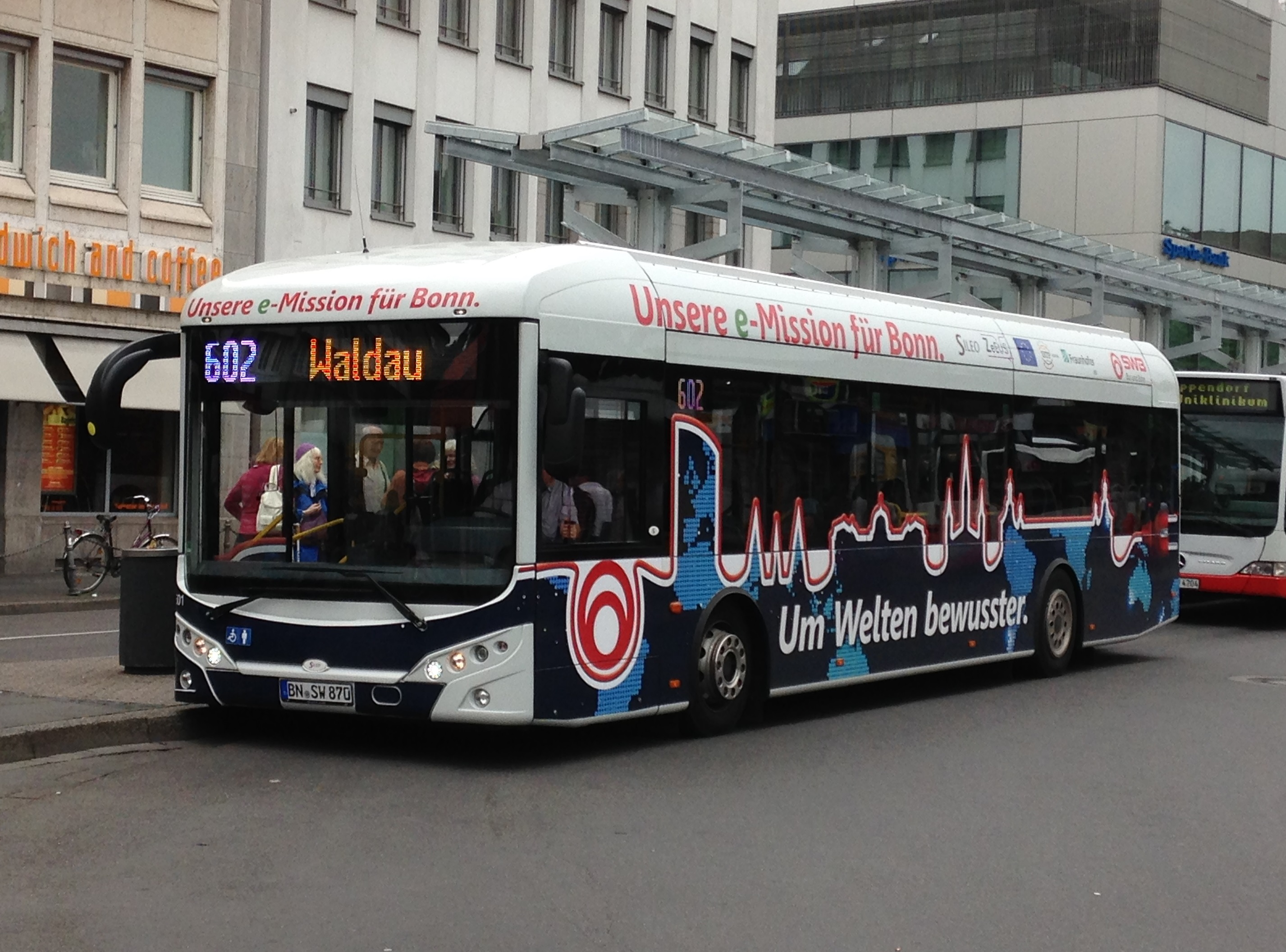 Sileo S12 der SWB Bus & Bahn am Bonner ZOB (31. Juli 2016)